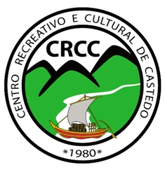 Logótipo do CRCC Artur Machado